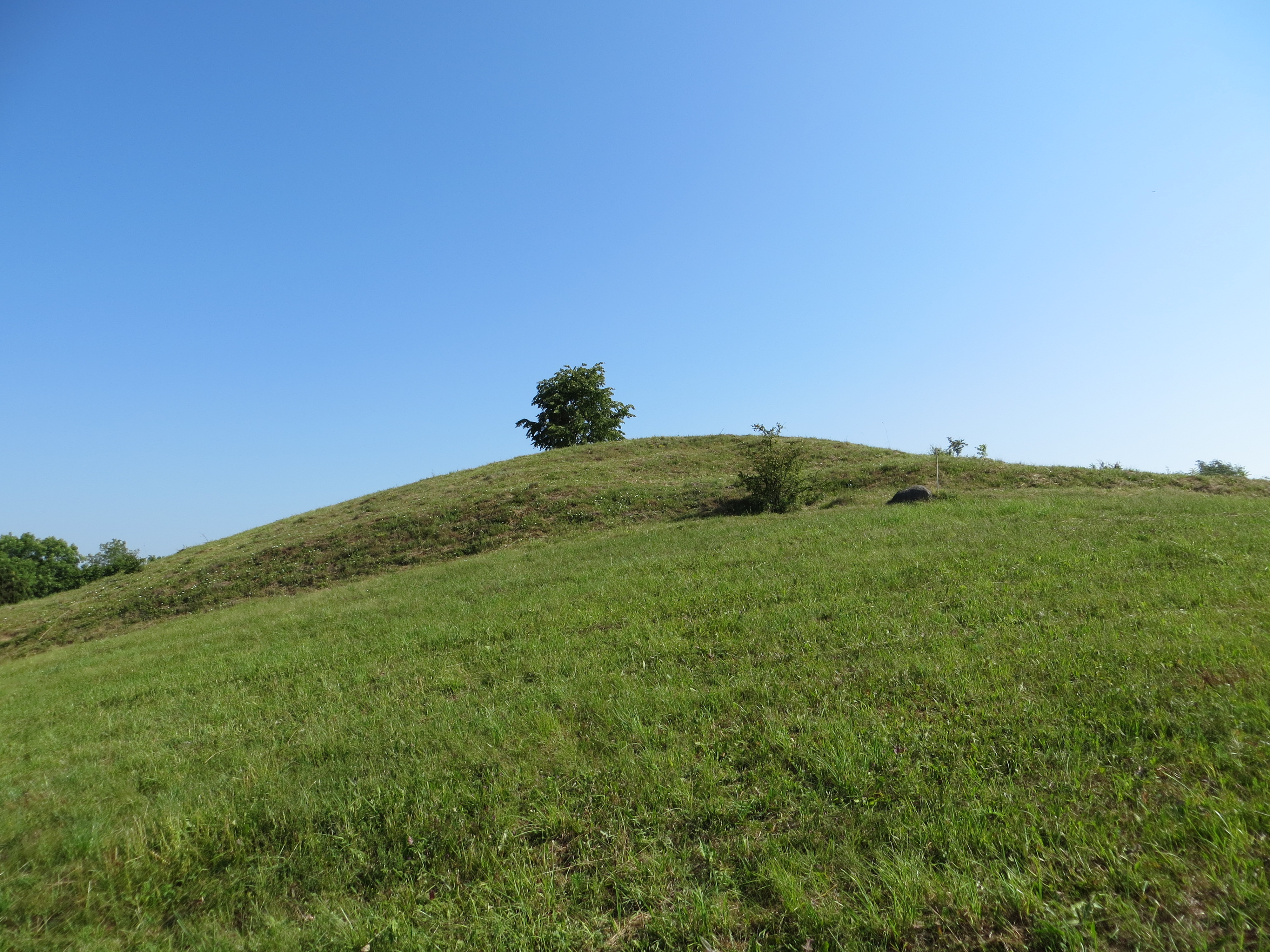 Buteliūnai, Lithuania